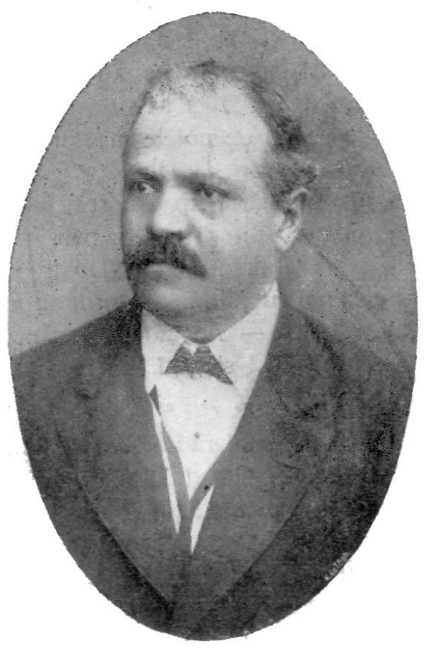 Pedagogul Vasile Petri